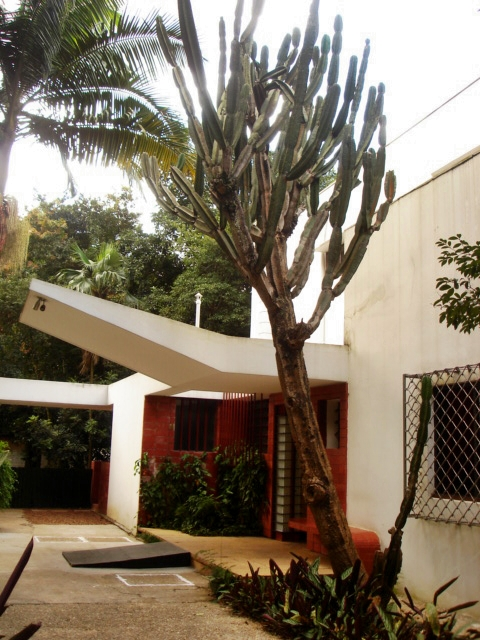 Marquise da casa modernista à rua Santa Cruz.